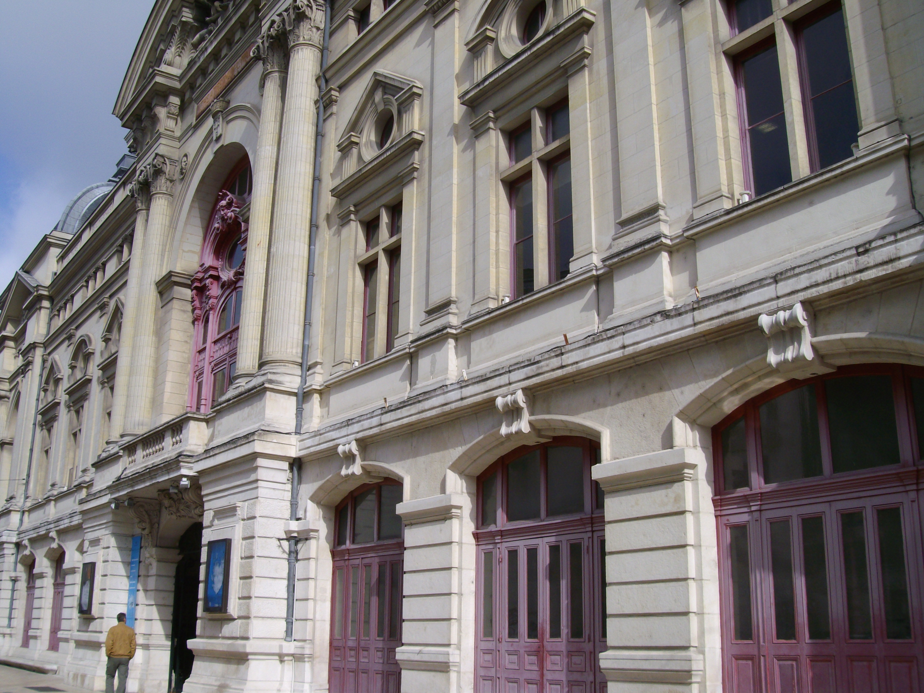 Opéra de Tours.